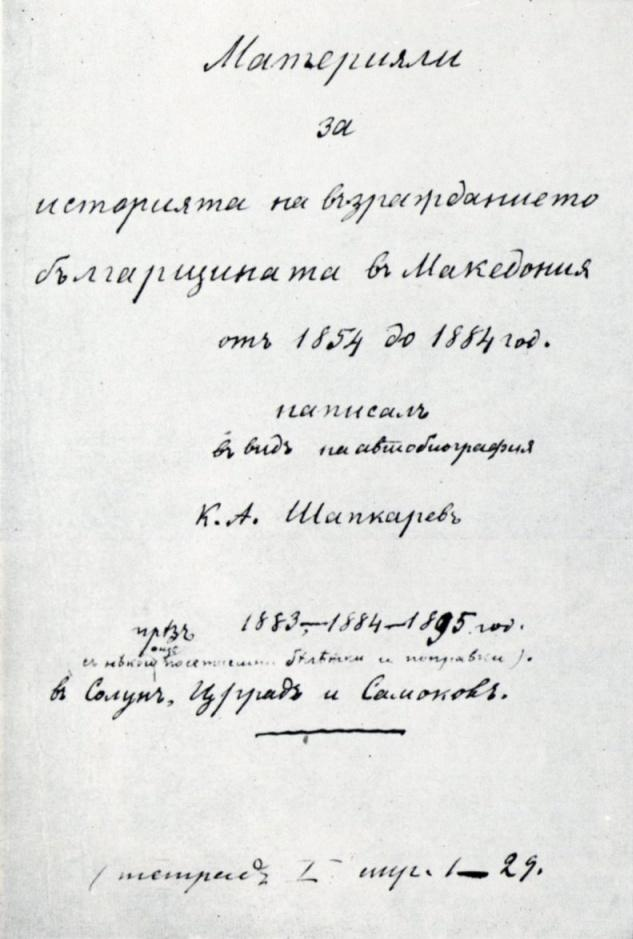 Заглавна страница на ръкописа на Кузман Шапкарев "За възраждането на българщината в Македония"